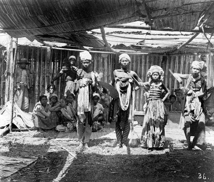 Repronegatief. Groep dansers uit Sasak